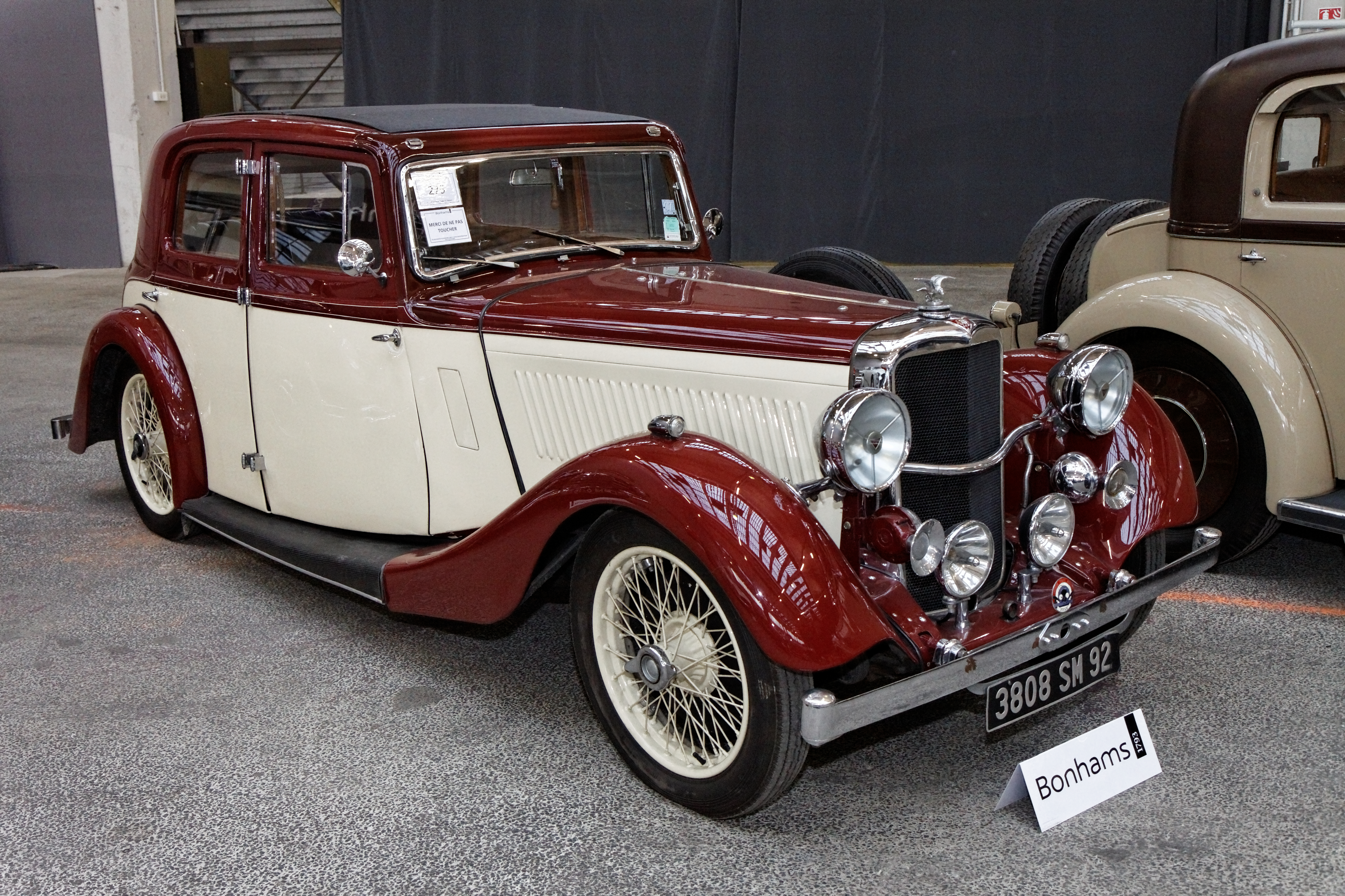 Alvis Silver Eagle SG Saloon